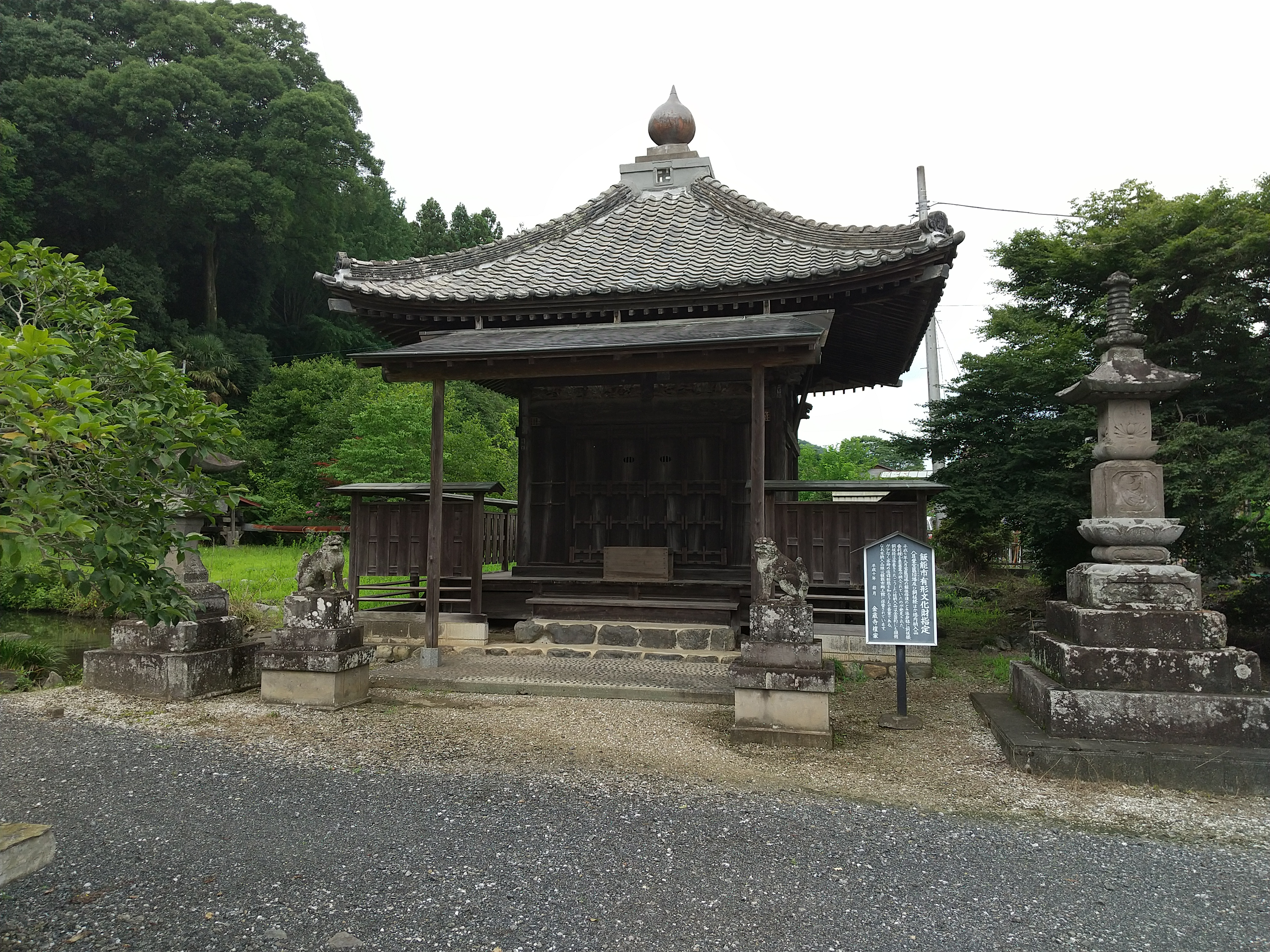 金蔵院の境外仏堂